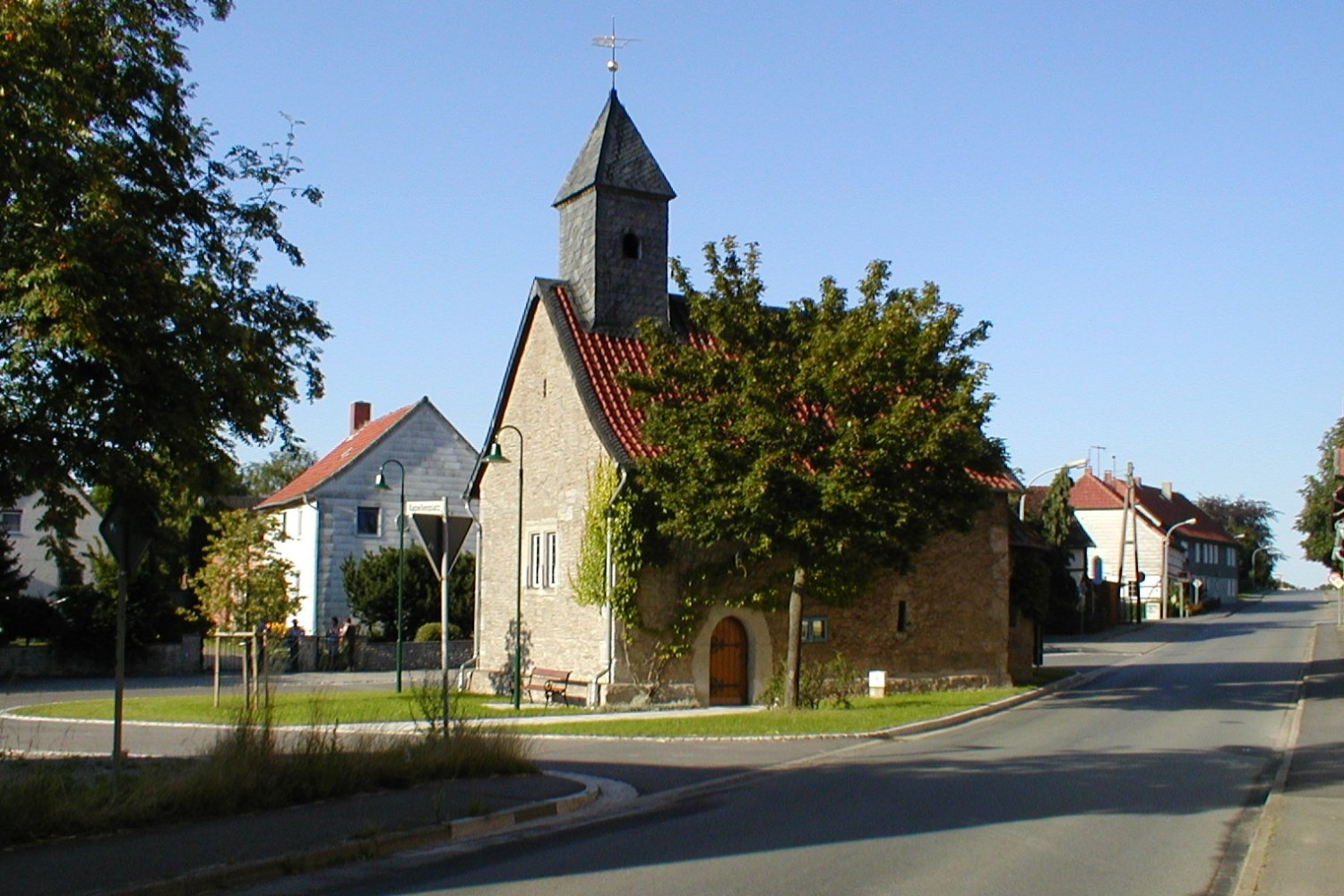 Königslutter OT Beienrode, Kapelle